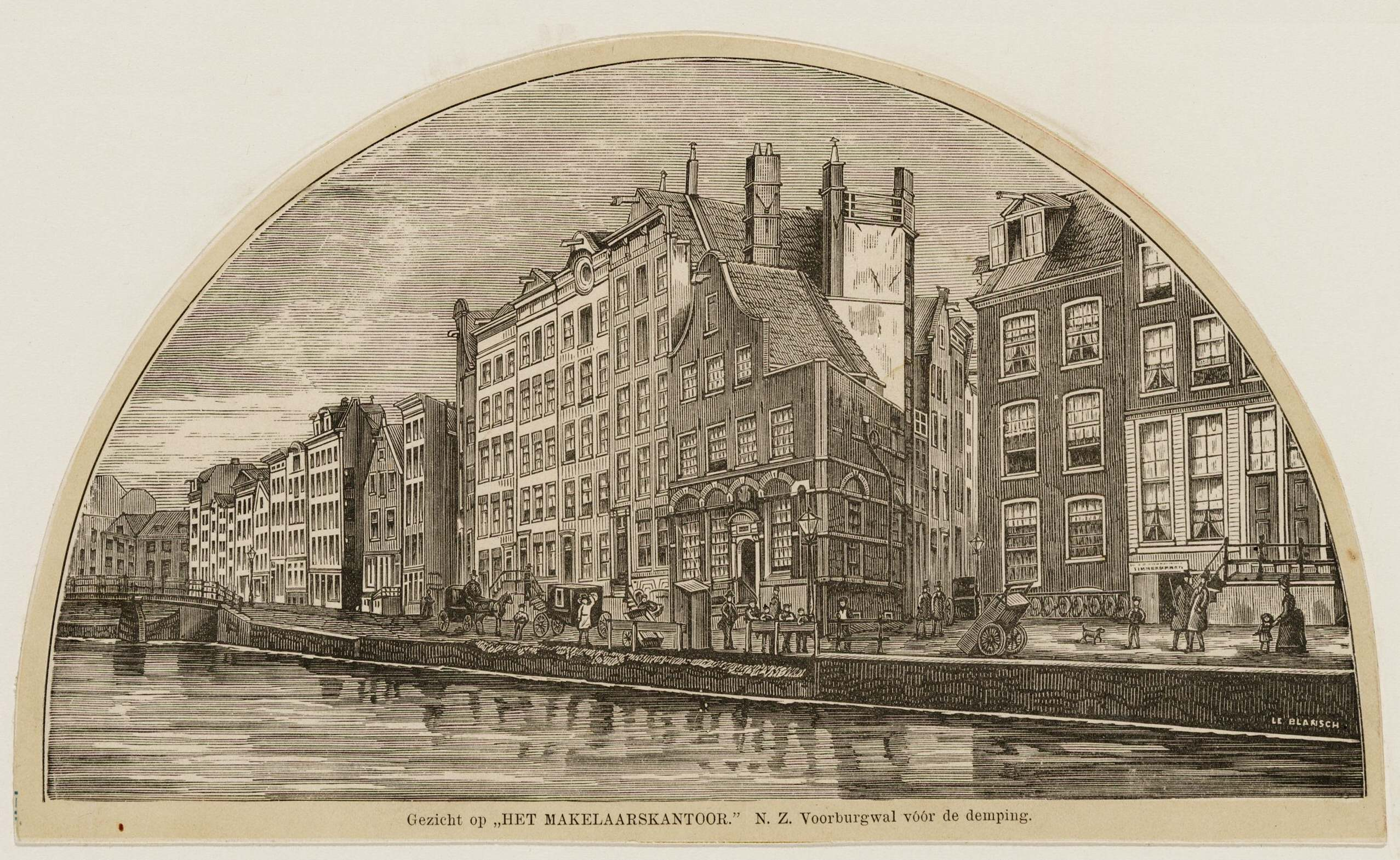 Gezicht op "Het Makelaarskantoor." N. Z. Voorburgwal vóór de demping.